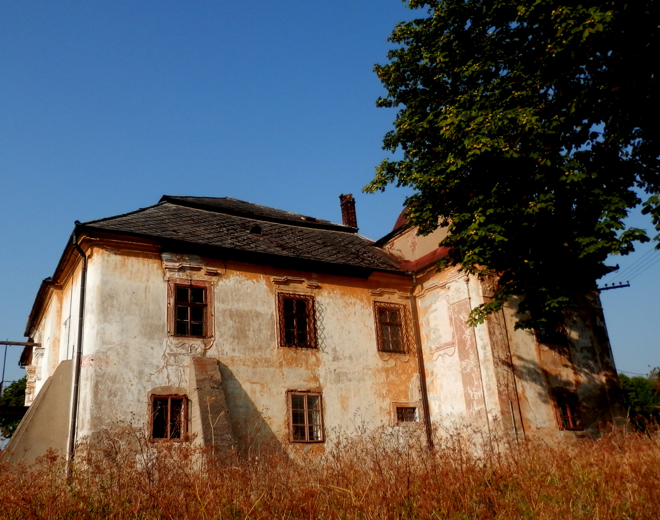 Barokový kaštieľ, doba vzniku 1614, Záborské, okres Prešov